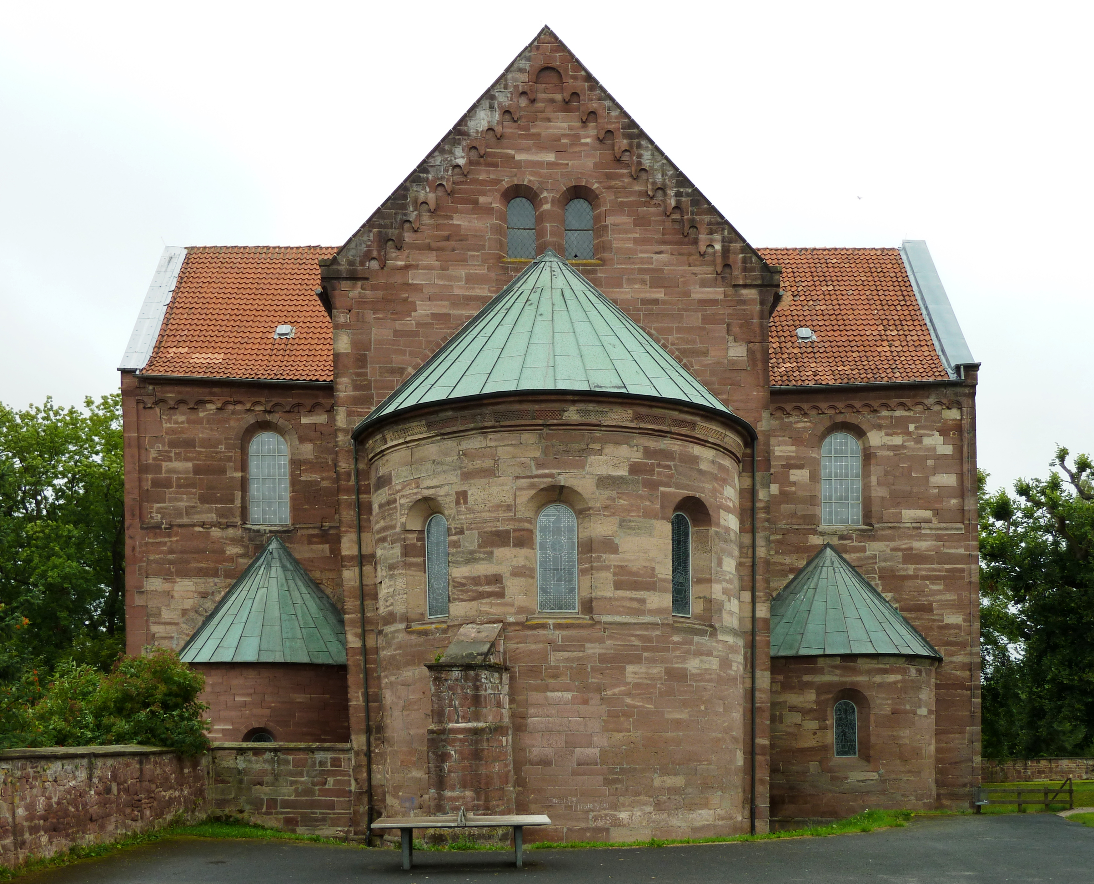 Ostansicht (mit Apsiden) der ehemaligen Klosterkirche St. Blasii und Marien in Fredelsloh, Stadt Moringen, Südniedersachsen.